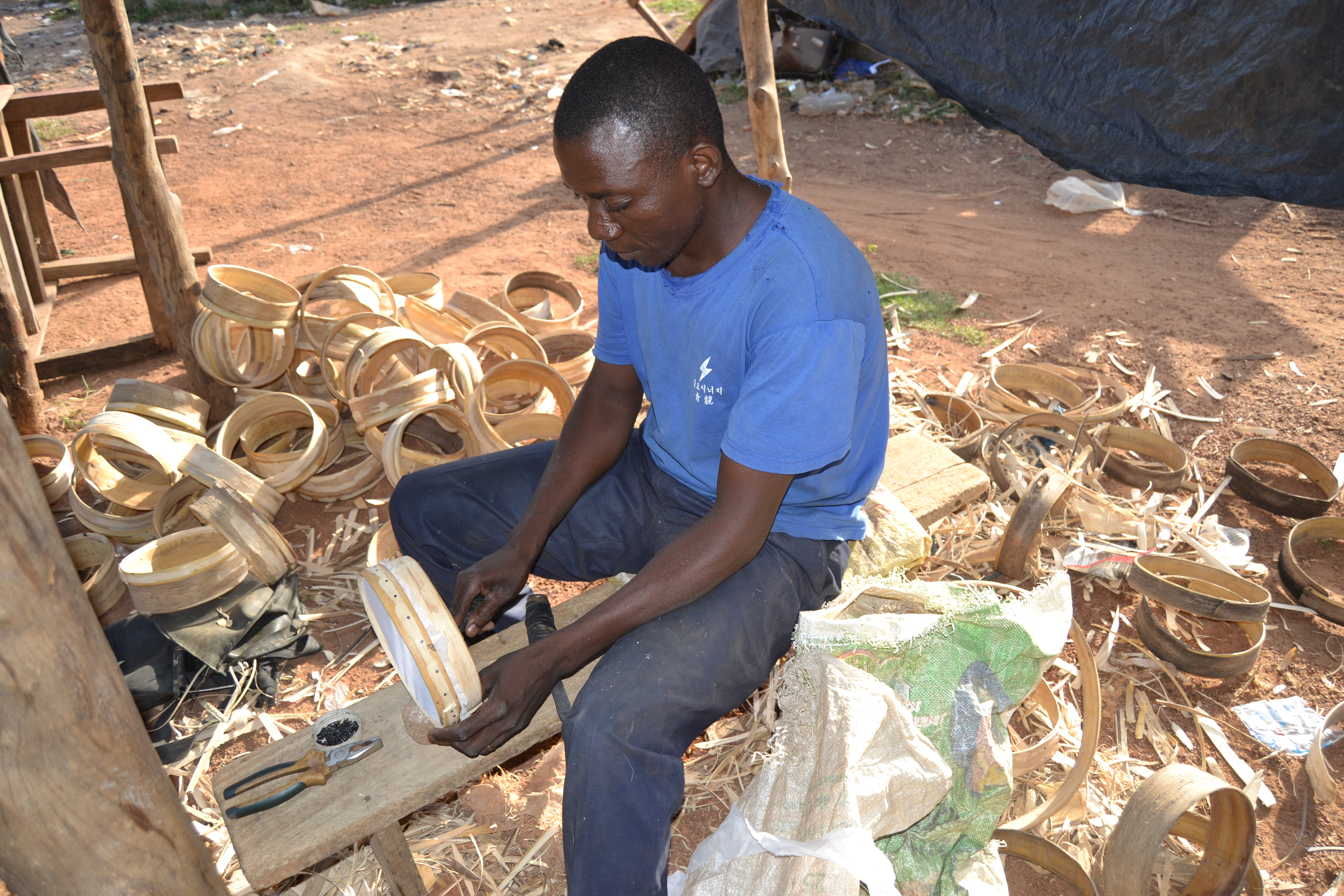 Un artisan en pleine fabrication de tamis à Ferkessédougou (Ferké), dans le Nord de la Côte d’Ivoire. L’instrument formé d'un réseau plus ou moins serré de fils textiles ou métalliques, ou d'une surface percée de trous, tendus sur un cadre, sert à séparer des particules solides de tailles différentes ou à filtrer des liquides. Les populations l’utilisent généralement en cuisine et pour la fabrication de jus.